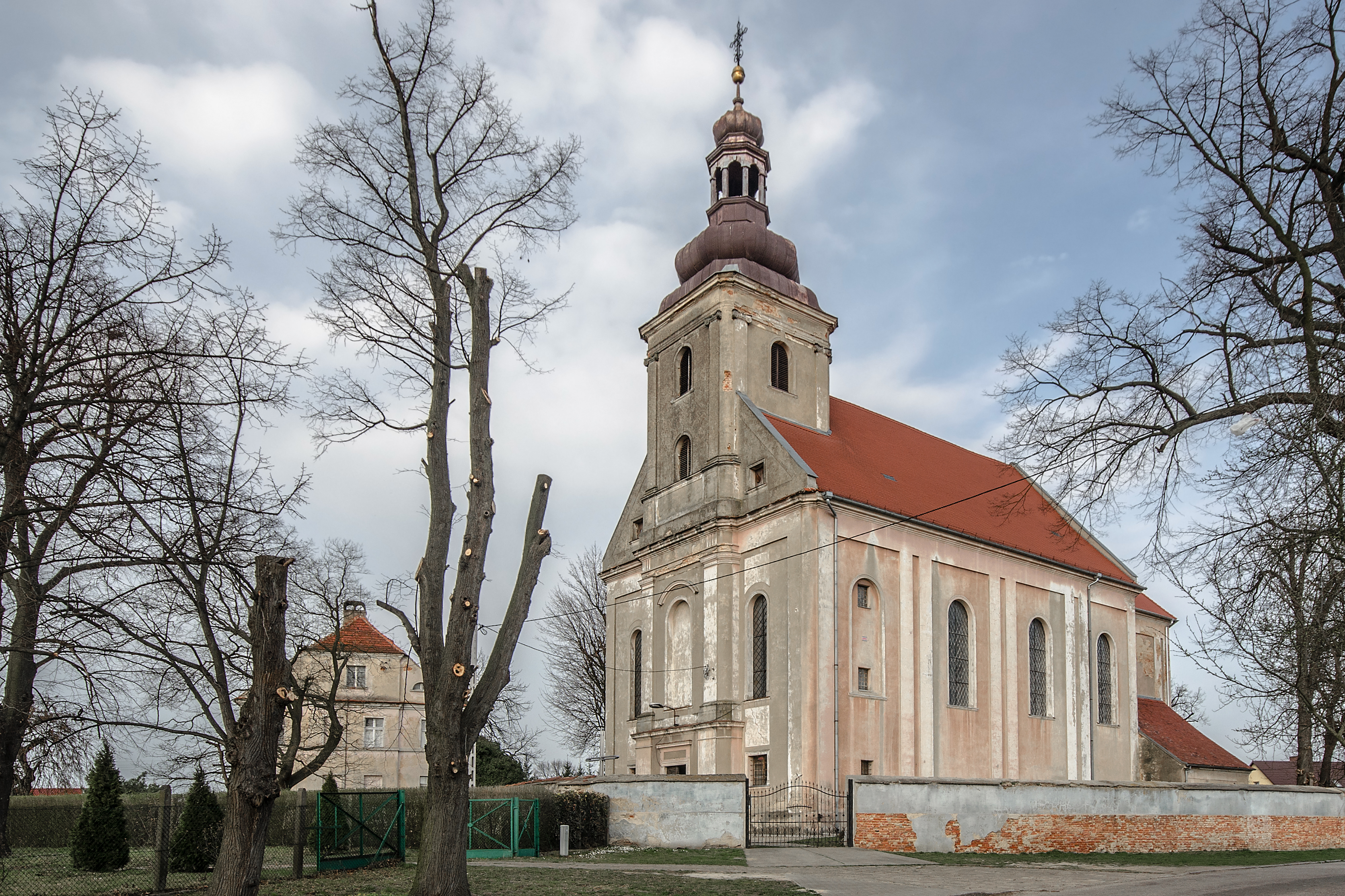 Powidzko, kościół par. p.w. św. Jana Chrzciciela, kon. XVIII